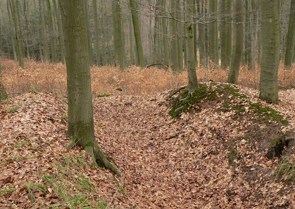 Beusterburg, Walldurchstich